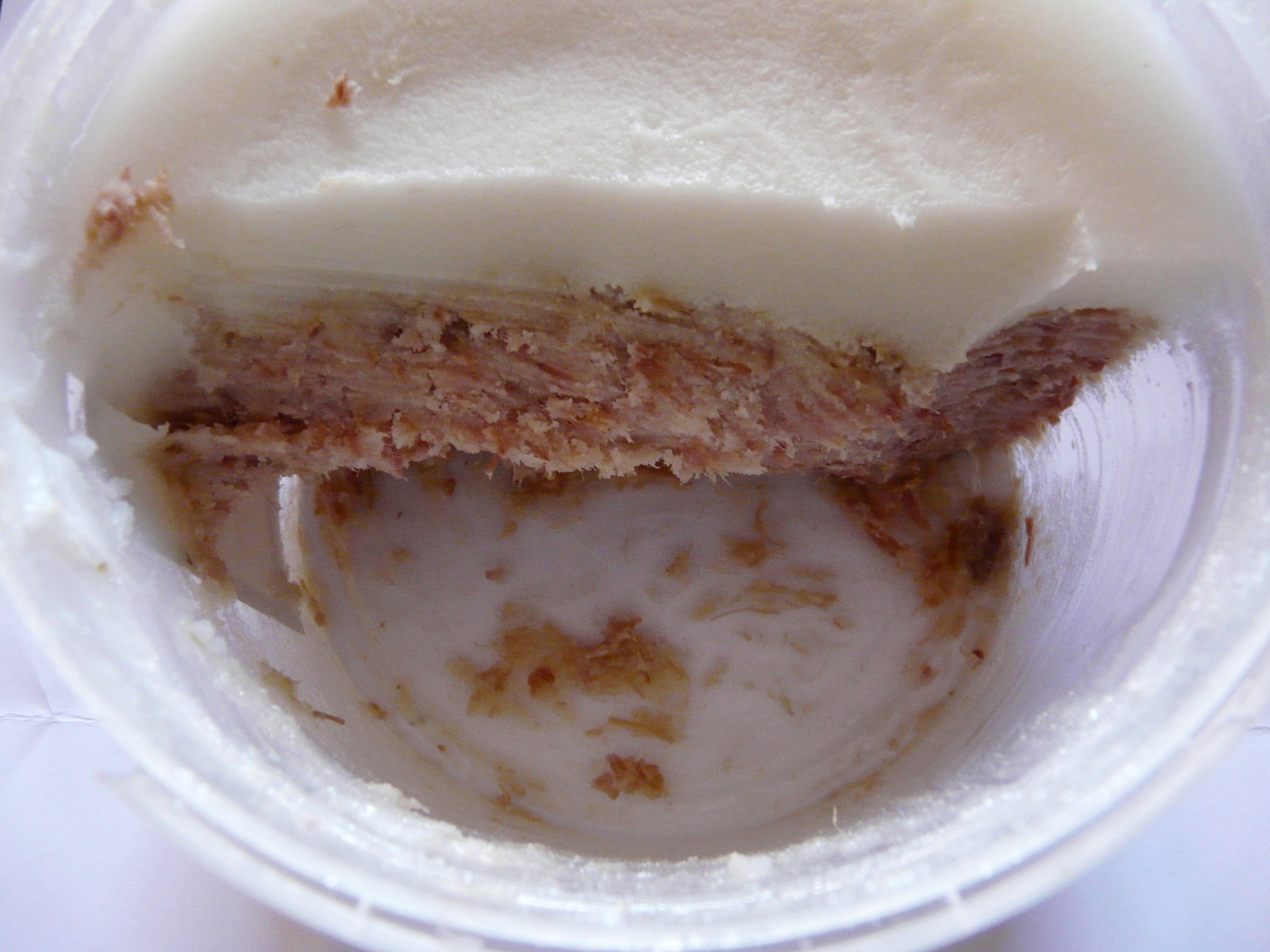 Zurrapa de lomo, plato típico de la Gastronomía andaluza, España.